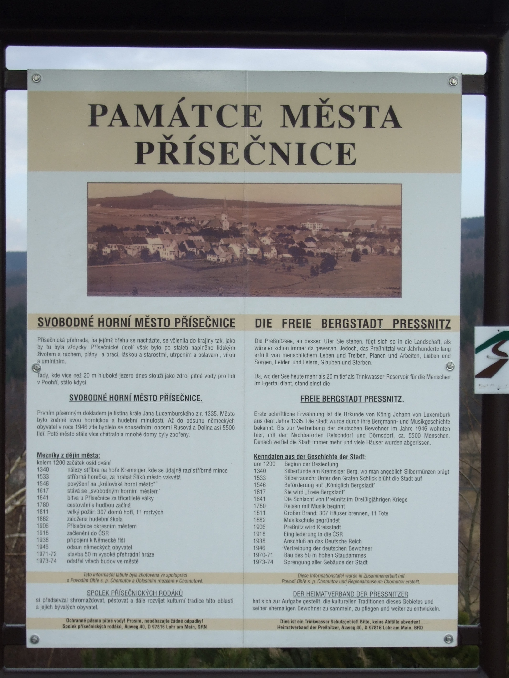 Informationstafel über die ehemalige Stadt Preßnitz im Erzgebirge (Přísečnice) am Damm der Talsperre Preßnitz